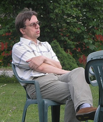 Helilooja Juhan Trump oma koduaias Aruküla kohvikute päeval